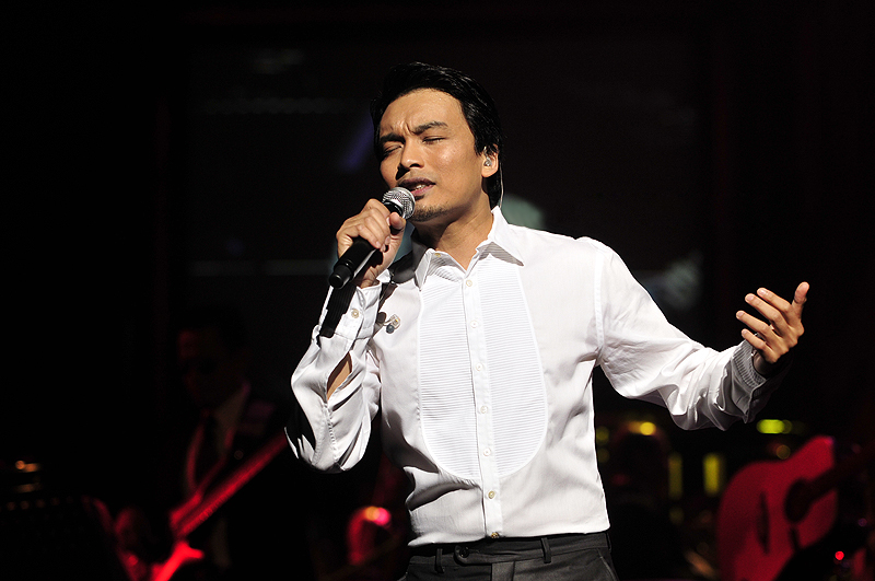 Konsert Lelaki Ini Anuar Zain Istana Budaya, Kuala Lumpur